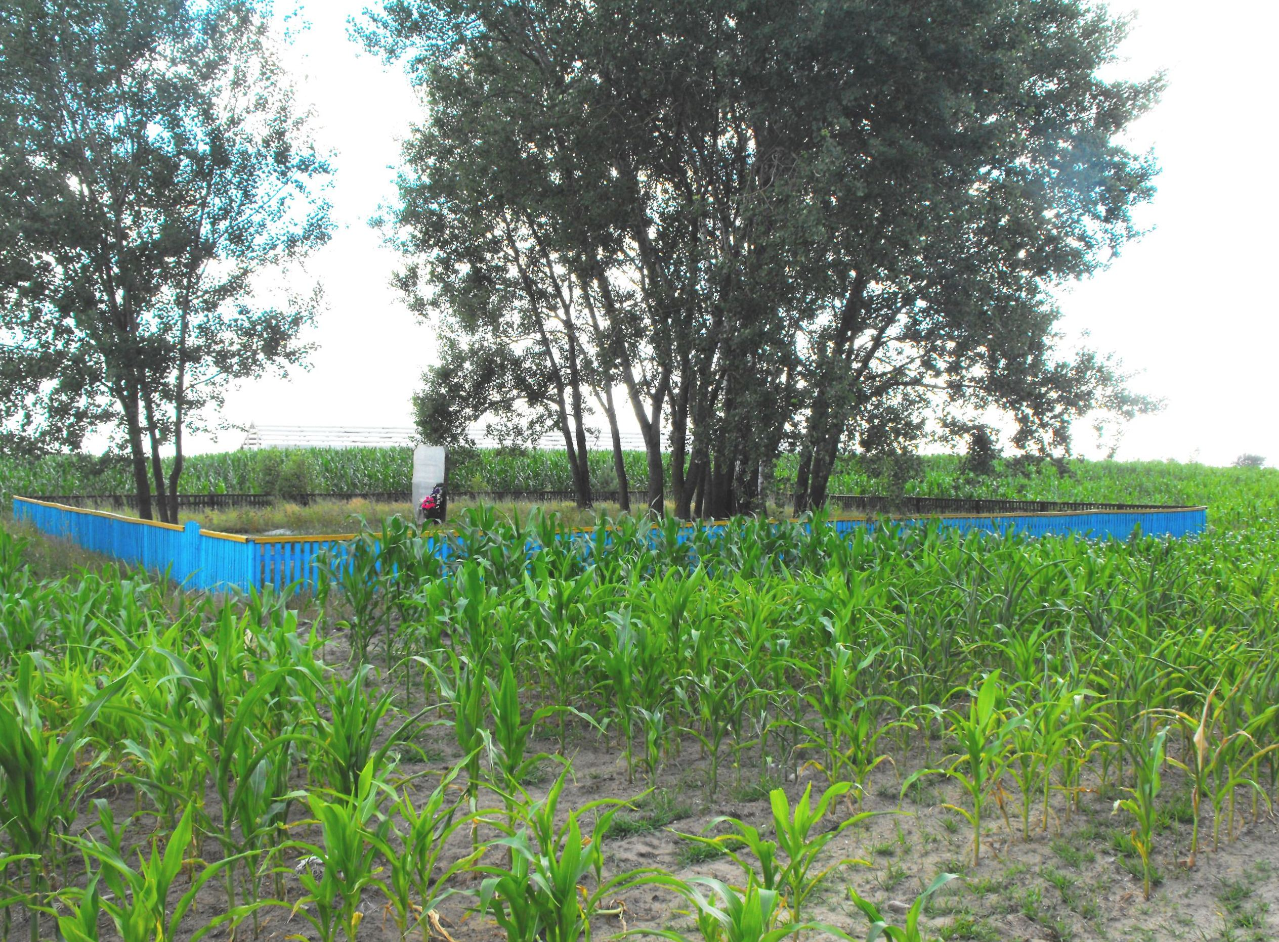 Памятник на окраине города Мотоль Брестской области на одном из мест убийства нацистами и полицаями евреев Мотоля во времена Холокоста.